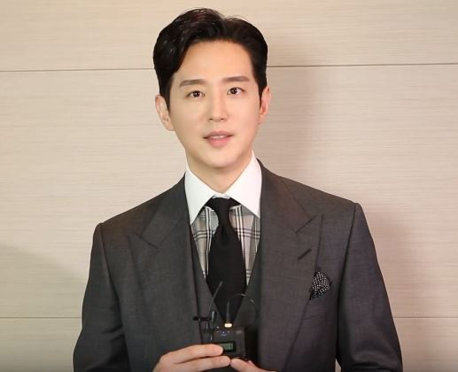 천년 영조 이금과 조선사헌부가 꿈꿨던 '새로운 조선'의 이야기